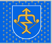 Flag of Mažeikiai and Mažeikiai district